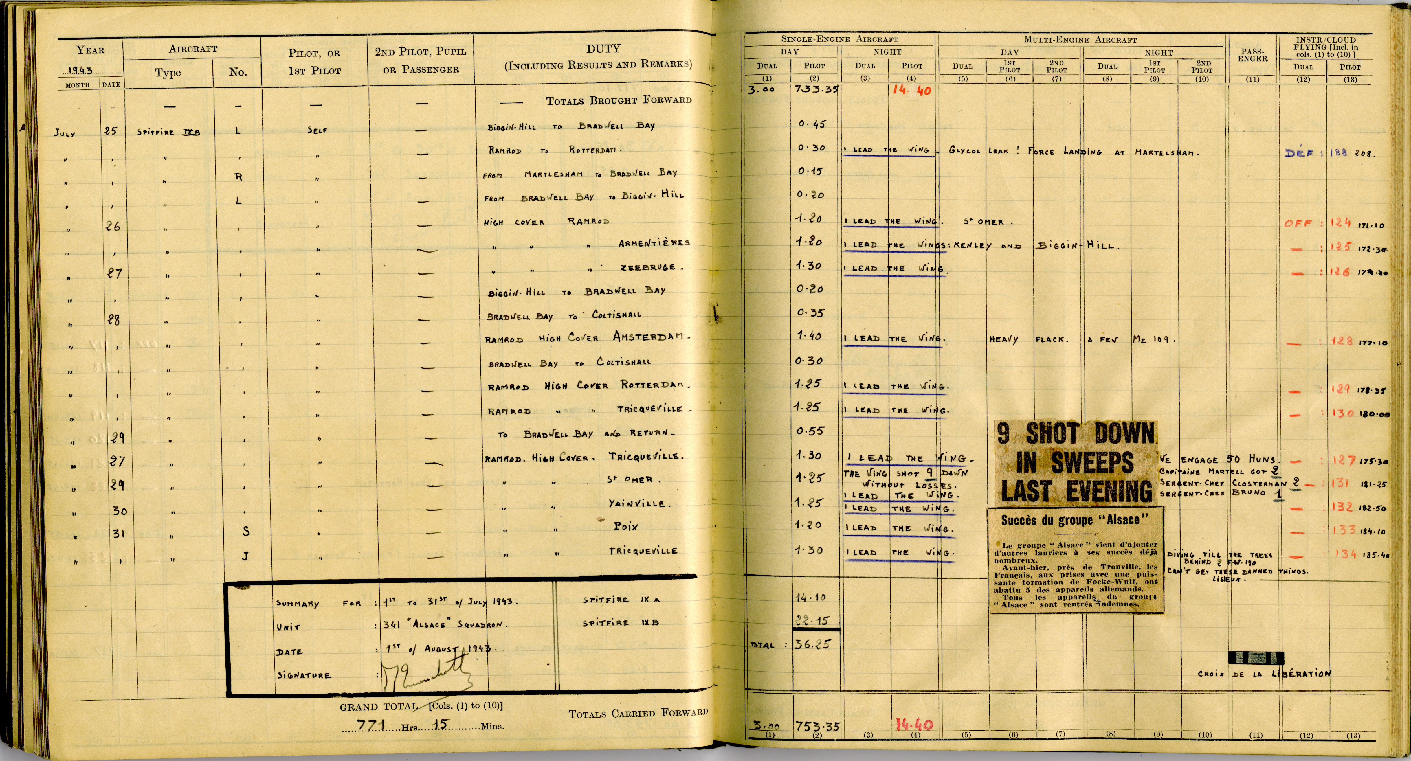 Page du livre de Bord de René Mouchotte Juillet 1943